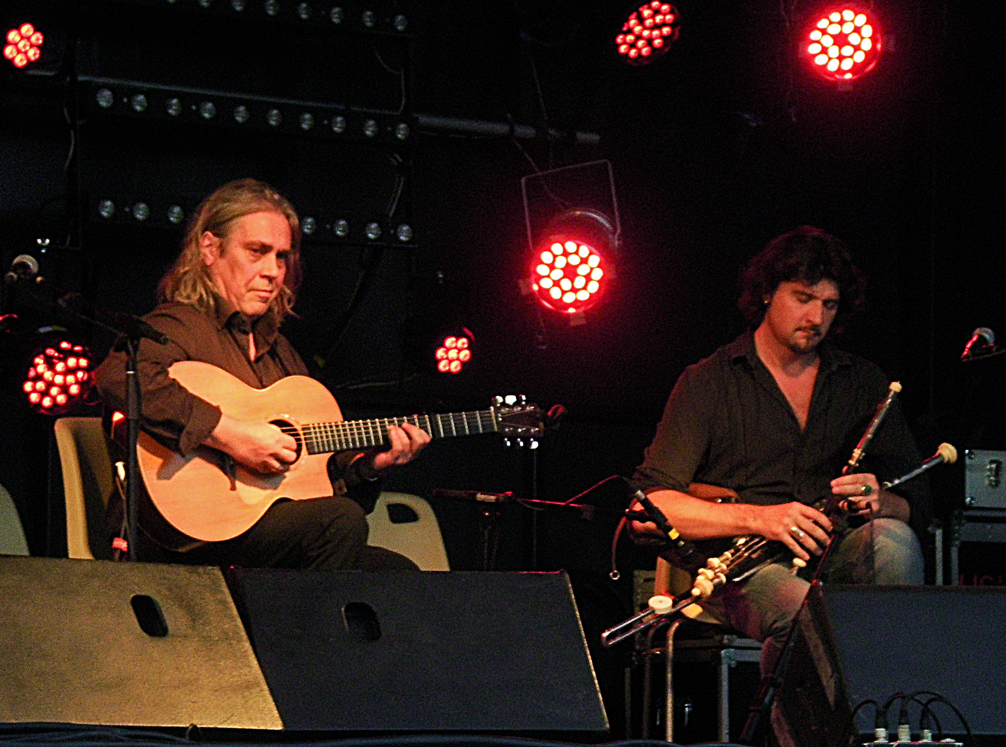 Nicolas Quemener à Roscoff (Finistère, Bretagne) le 18 août 2012.